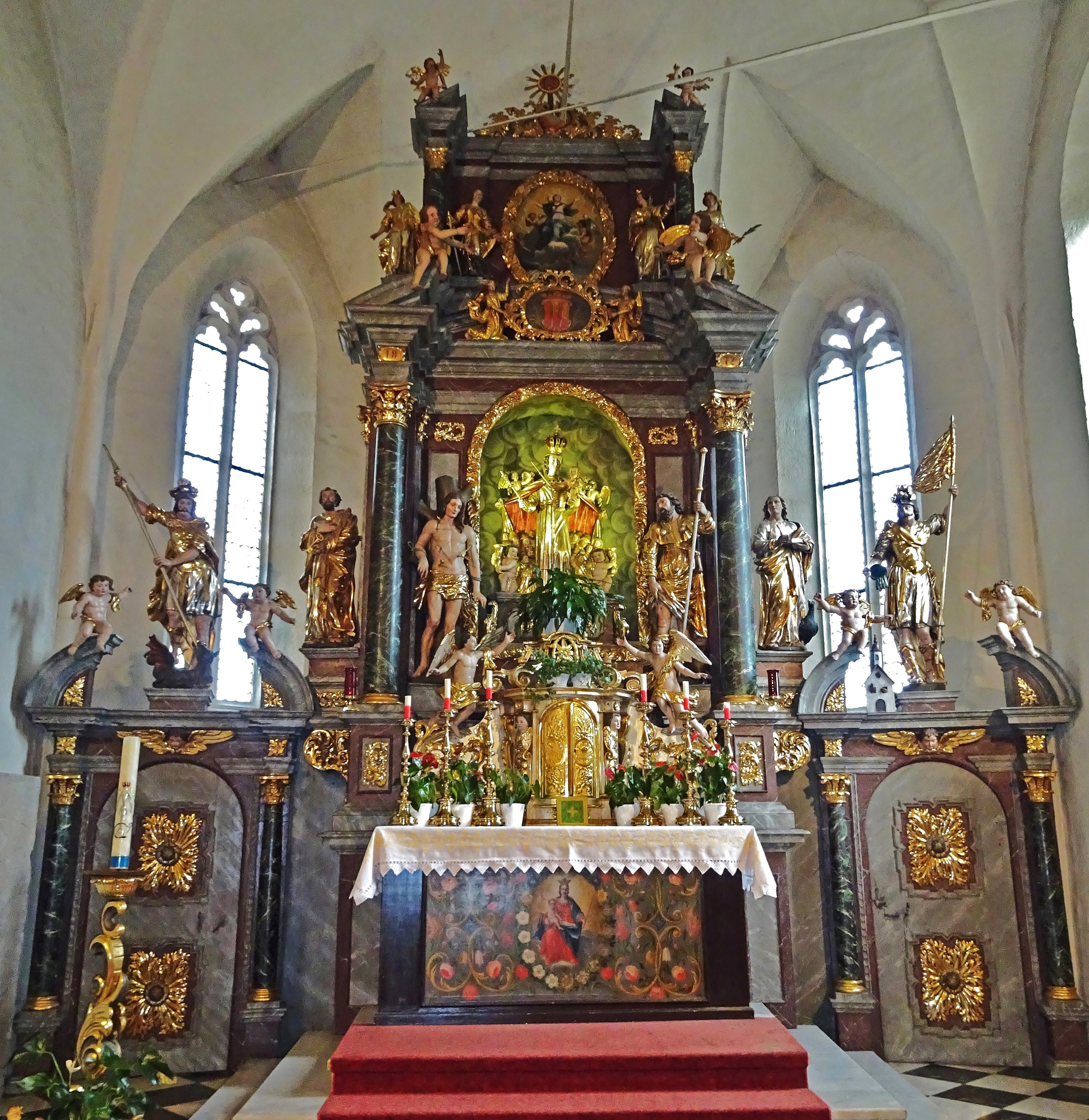 Kath. Pfarrkirche Zu Unserer Lieben Frau Maria Gail (Villach), der Hochaltar